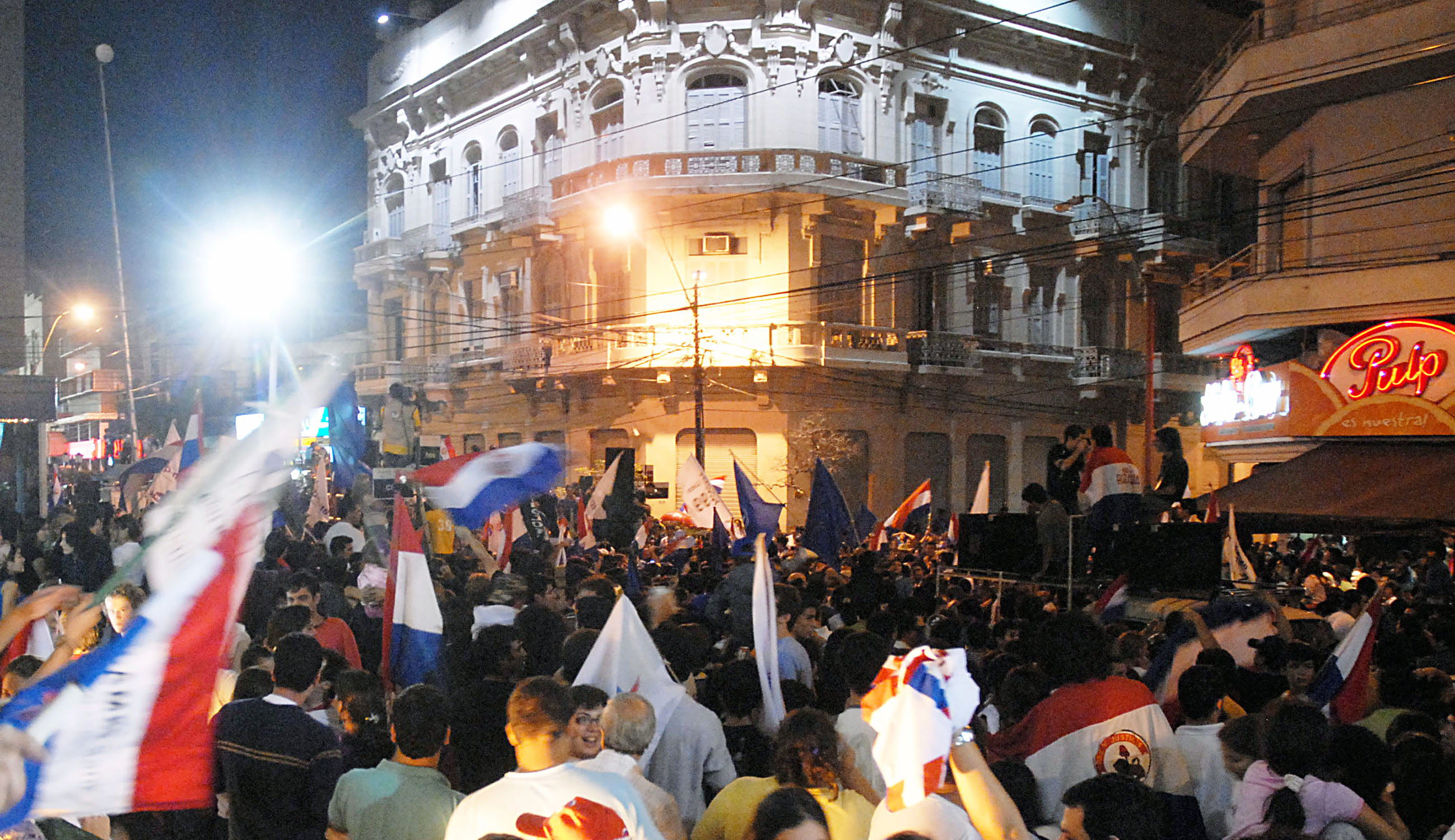 Assunção (Paraguai) - Paraguaios festejam vitória do candidato da Aliança Patriótica para a Mudança, Fernando Lugo